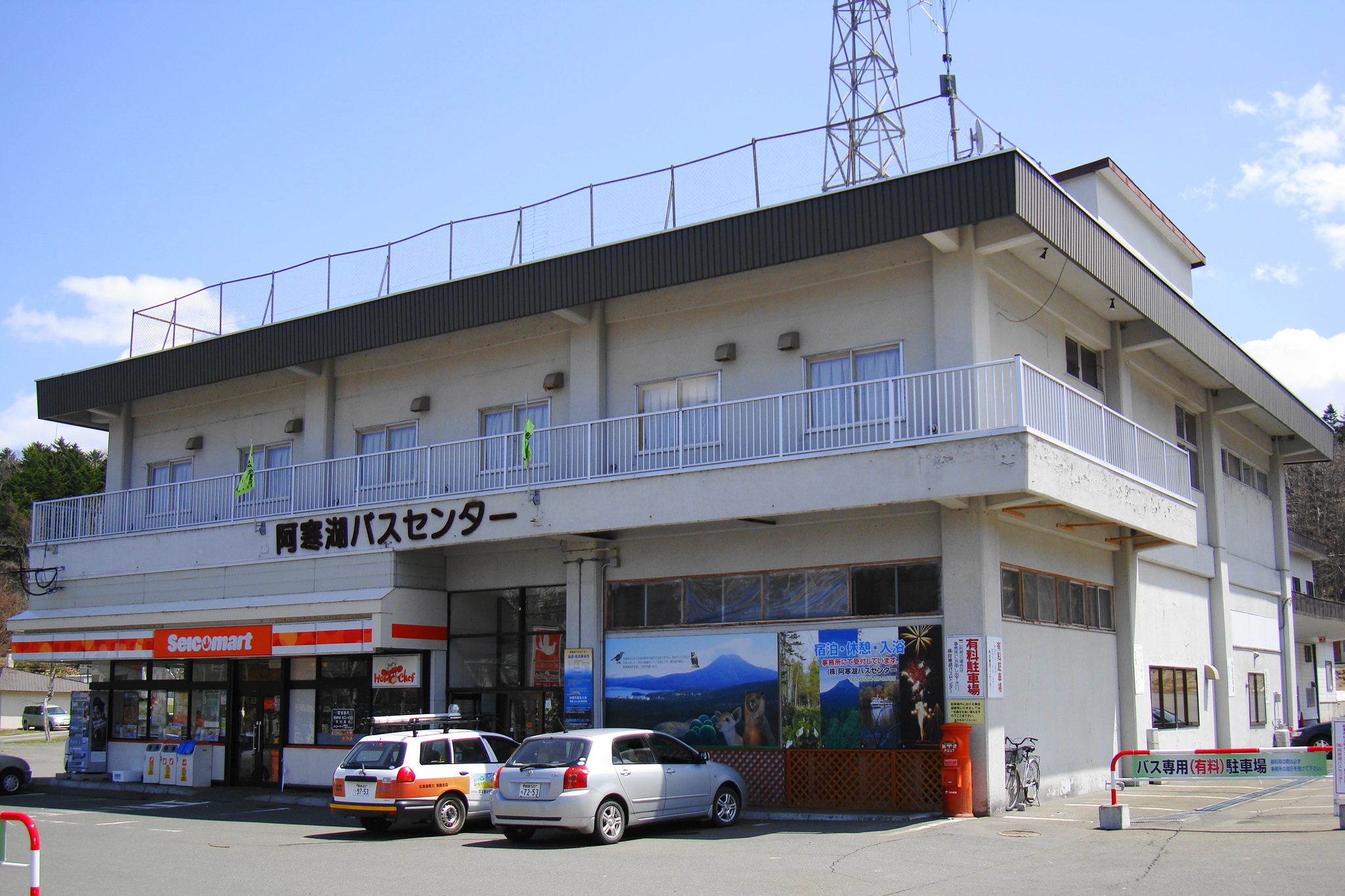 Akan-ko depot, Akan-ko Bus Center